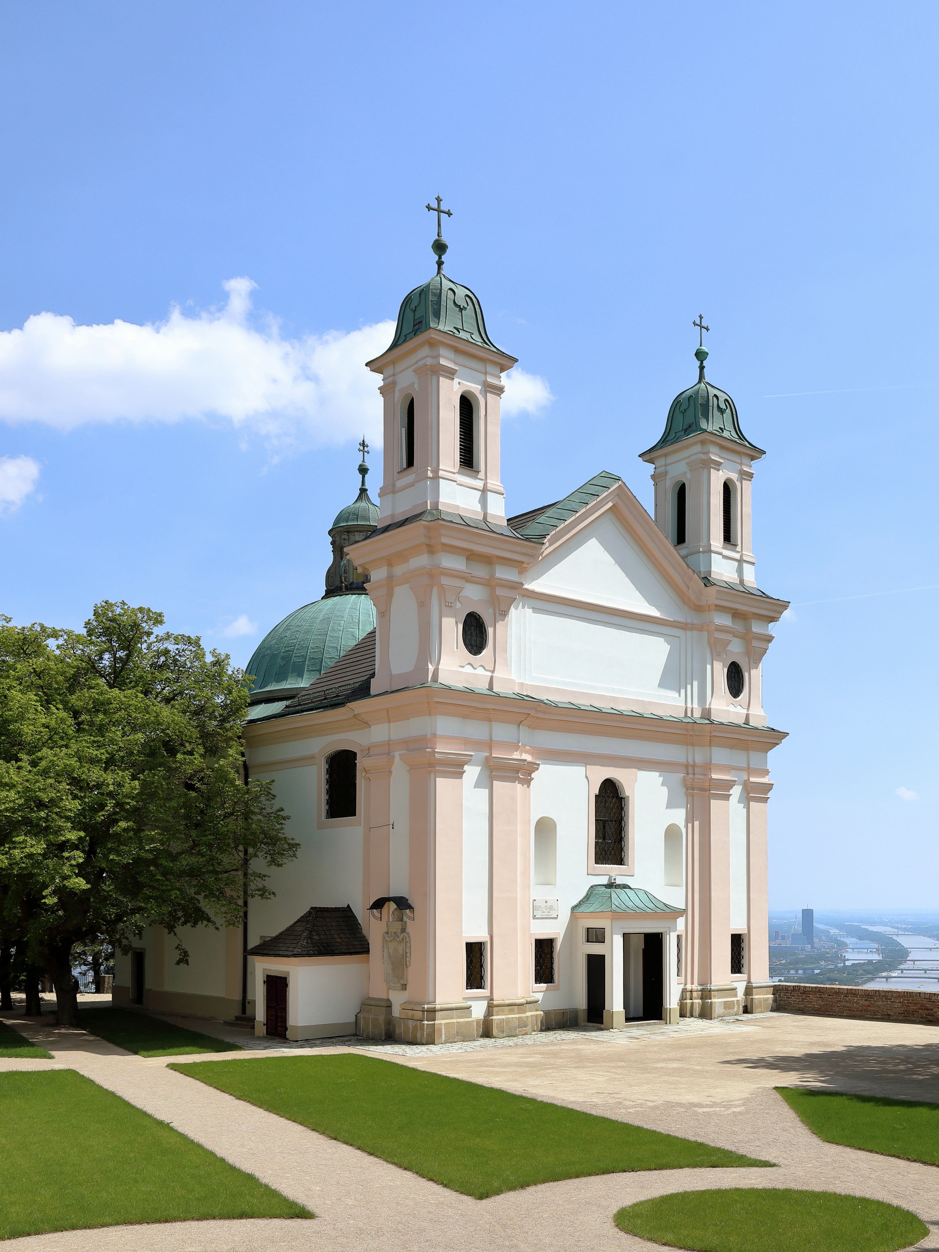 Nordwestansicht der Kirche am Leopoldsberg im 19. Wiener Gemeindebezirk Döbling.Anlässlich der Pest in Wien ließ Kaiser Leopold I. 1679 am Leopoldsberg - damals noch Kahlenberg bezeichnet - eine Kapelle errichten und widmete ihn dem 1485 heiliggesprochenem Babenberger Markgrafen Leopold III. Bei der 2. Türkenbelagerung wurde die Kapelle schwer beschädigt, wieder instandgesetzt und 1693 neu geweiht, wobei der Berg gleichzeitig in Leopoldsberg umbenannt wurde. Um 1720 wurde die Kapelle nach Plänen von Antonio Beduzzi zu einer Kirche ausgebaut. Im 2. Weltkrieg erfolgte eine weitere schwere Zerstörung durch eine Fliegerbombe.